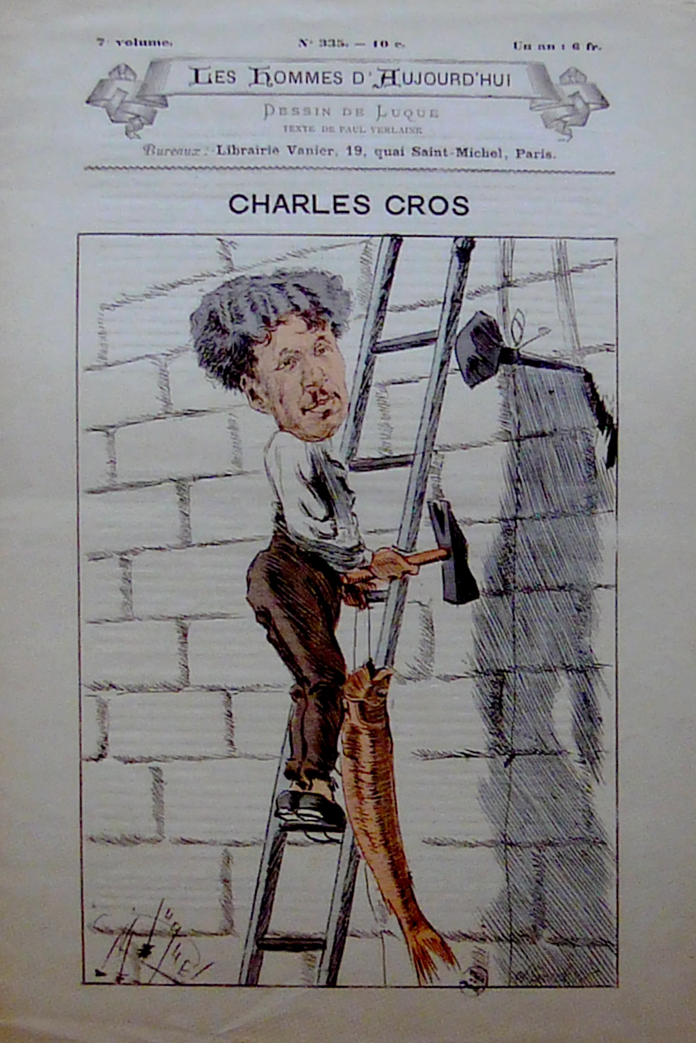 Les Hommes d'aujourd'hui, n°335 (1888). Caricature de Charles Cros par Manuel Luque.(Musée Carnavalet)